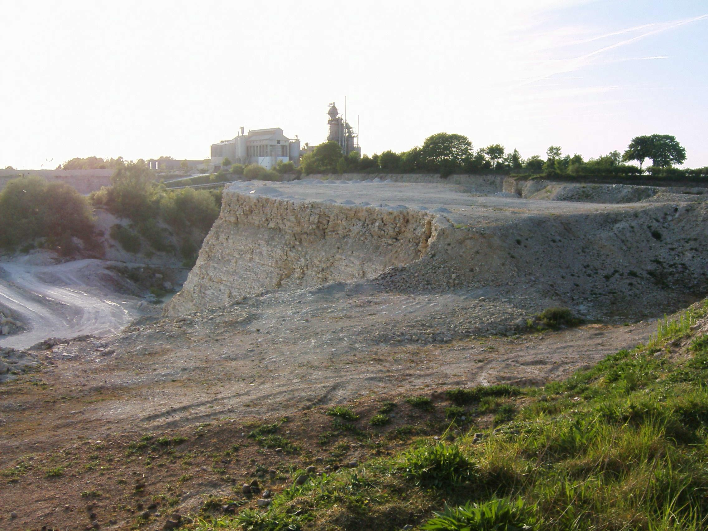 Kalksteinbruch Thieberg zwischen Rheine und Neuenkirchen mit Kalkwerk im Hintergrund. Blick von Südosten auf einen Steinbruch in Neuenkirchen (Kreis Steinfurt). Das zugehörige Kalkwerk der Firma Breckweg im Hintergrund liegt schon auf dem Gebiet der Stadt Rheine.